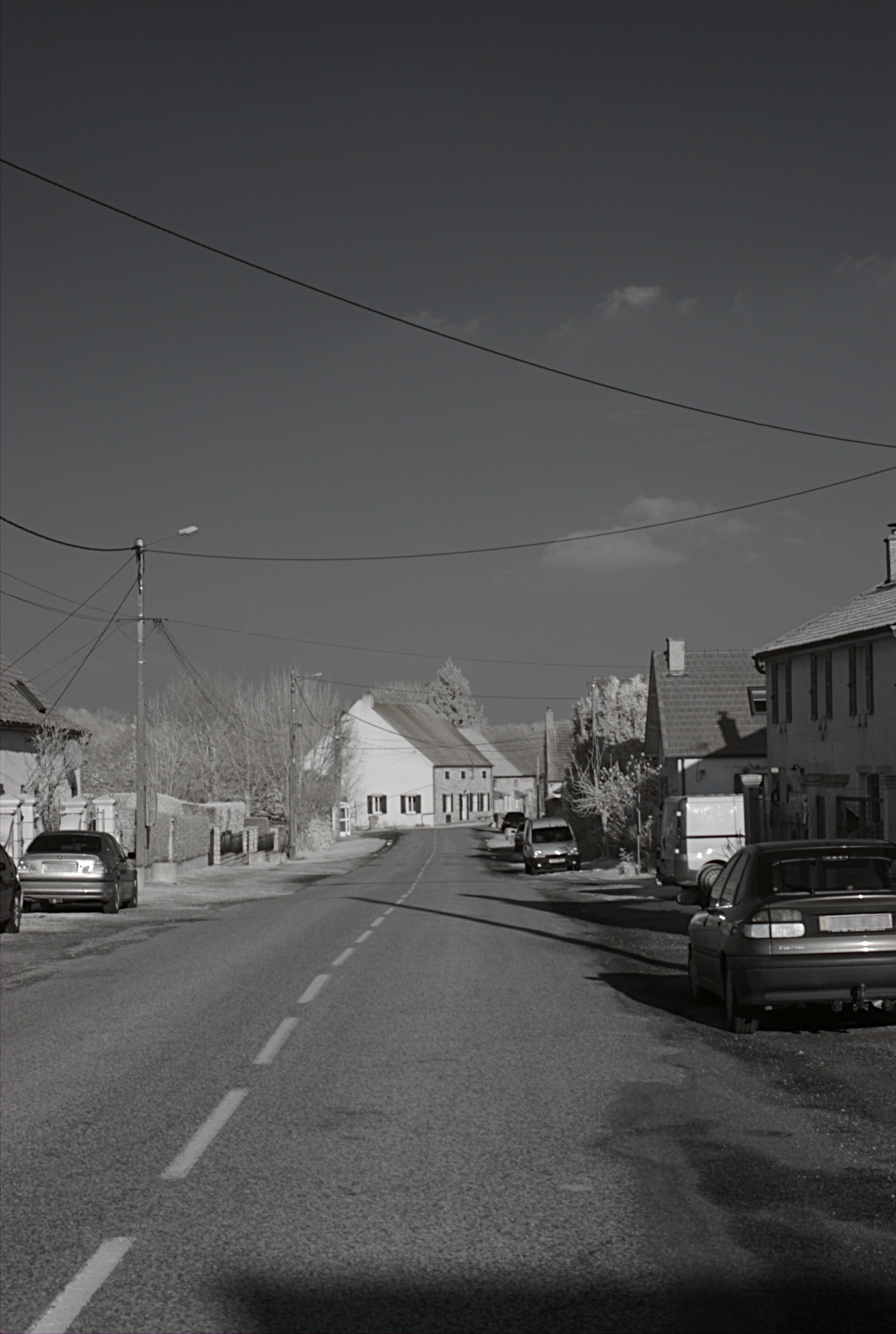 Route de Bonnencontre, Charrey-sur-Saône (Côte d'Or, Bourgogne, France) photographié avec un filtre infrarouge 760 nm.